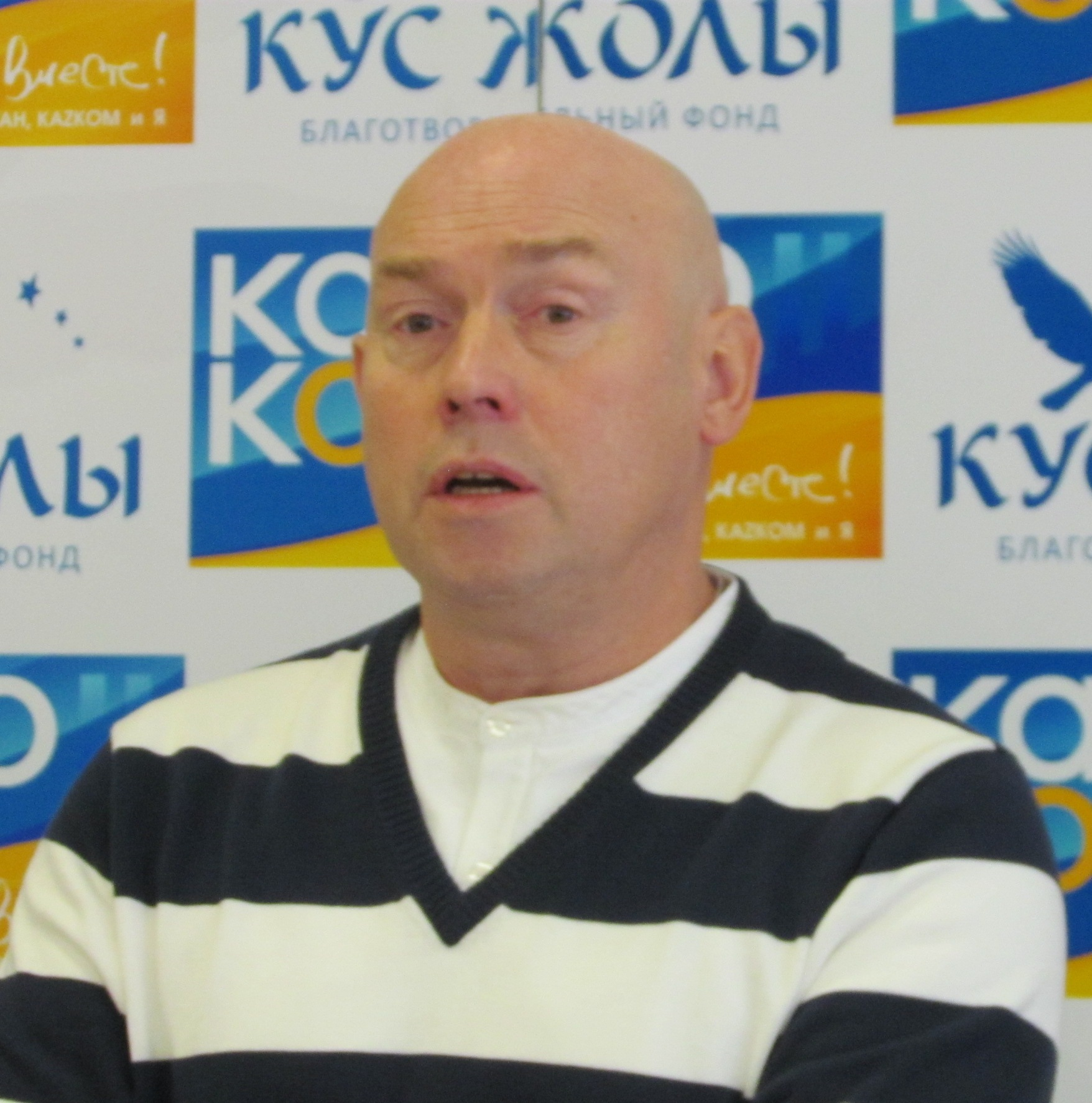 Виктор Иванович Сухоруков на пресс-конференции в Алма-Ате, 13 октября 2011 года